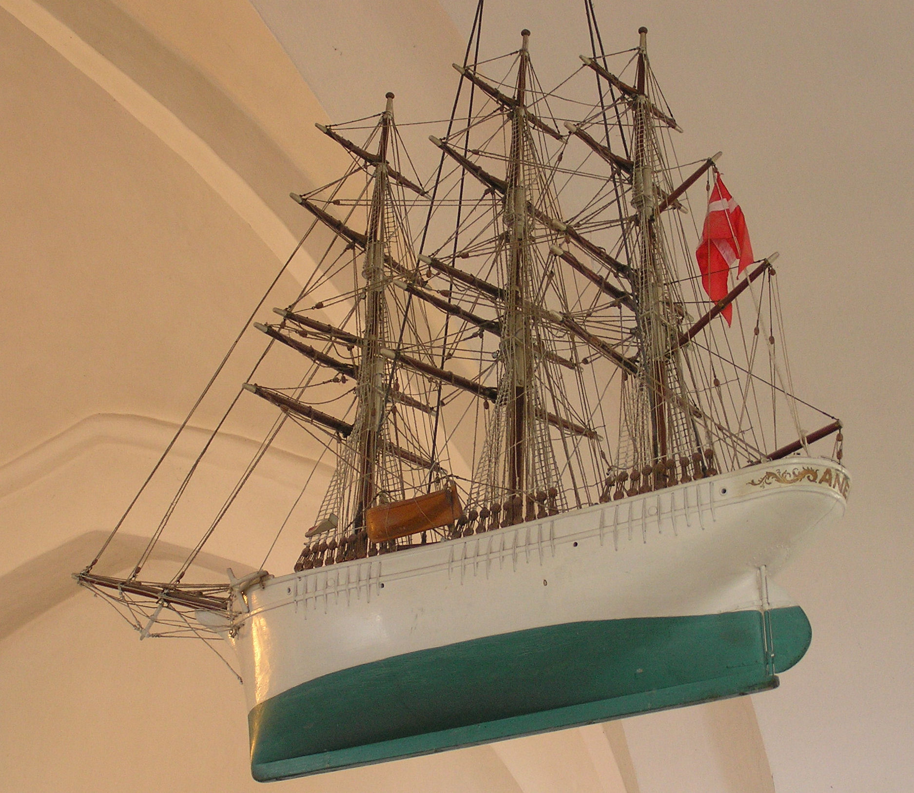 Fuldriggeren ‘ANE’ udført af Ola Andersson. Doneret af Aage Jensen til Højelse Kirke, Ll Skensved 1940-06-28